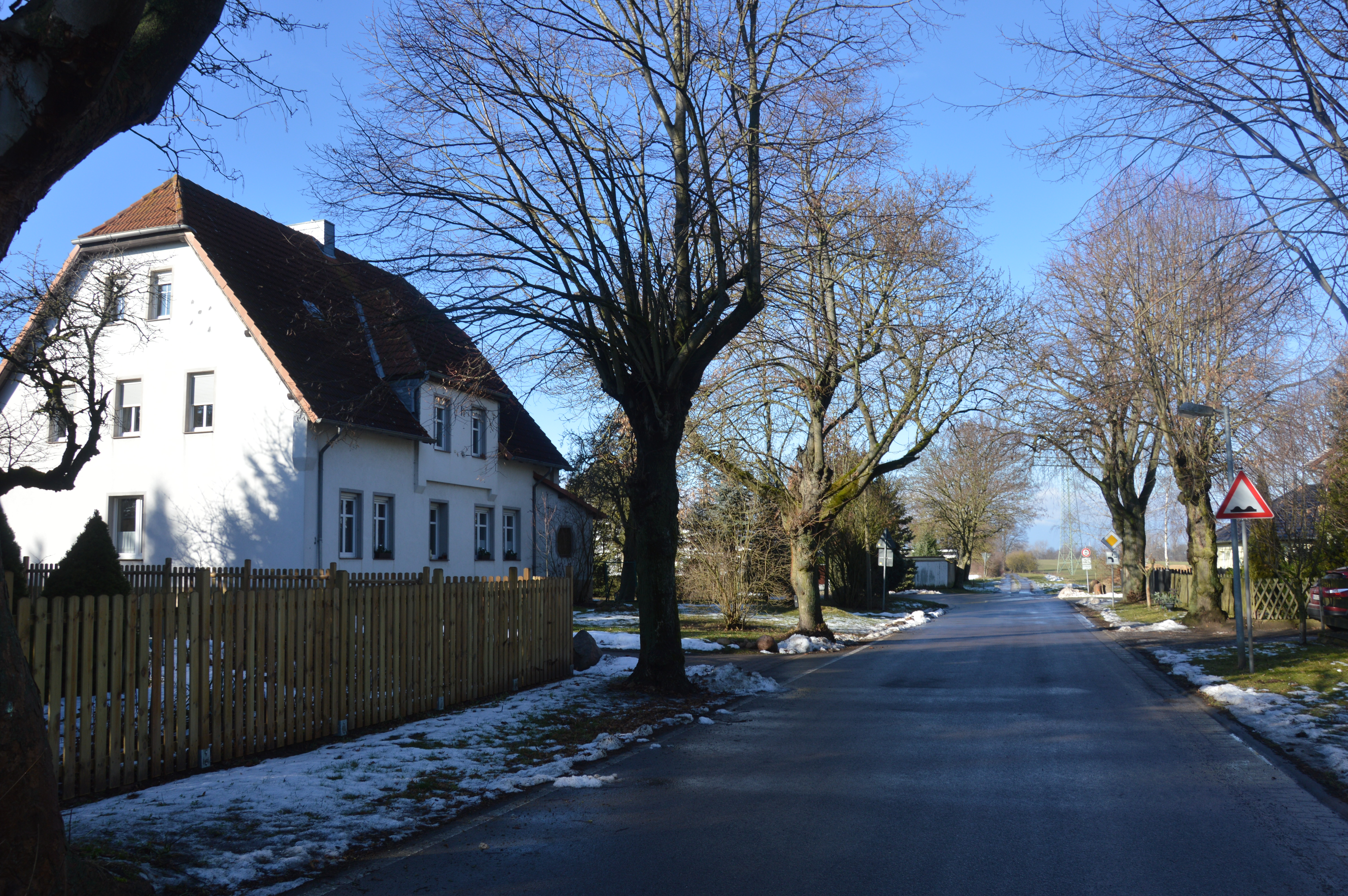 Straßenzug Neu Ummendorf